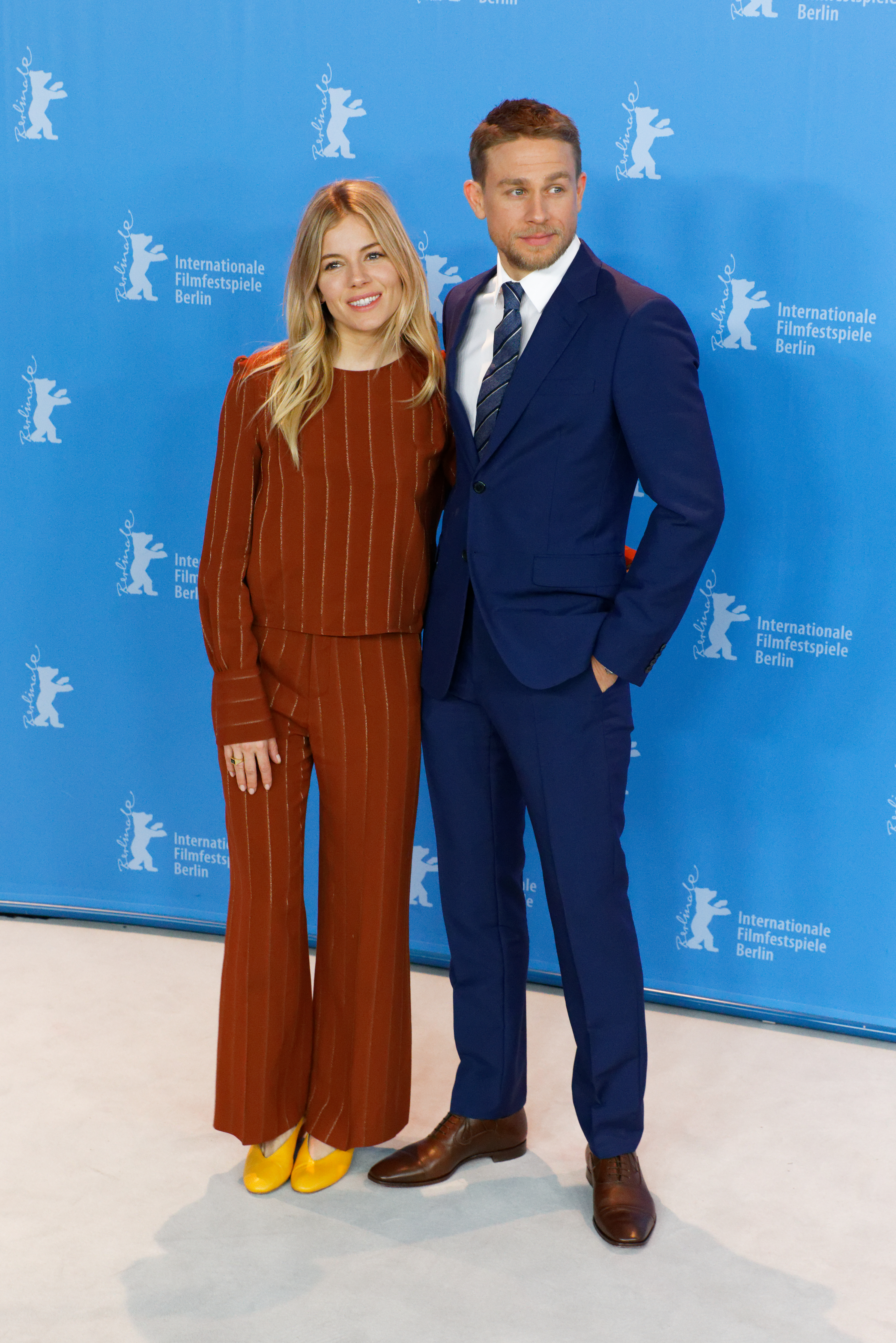 Sienna Miller und Charlie Hunnam beim Photo Call zu Die versunkene Stadt Z bei der Berlinale 2017